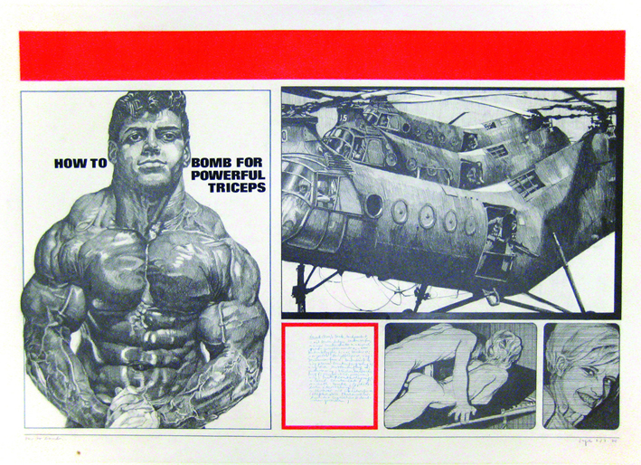 Peter Sorge, How to bomb, 1970, Graphit- und Farbstift auf Papier, 66 x 96,5 cm